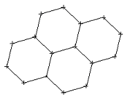 Pavage hexagonal. Image personnelle. Domaine public.